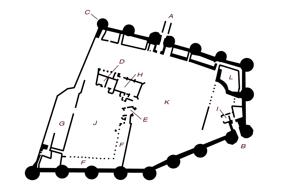 Mappa del castello di Angers senza legenda